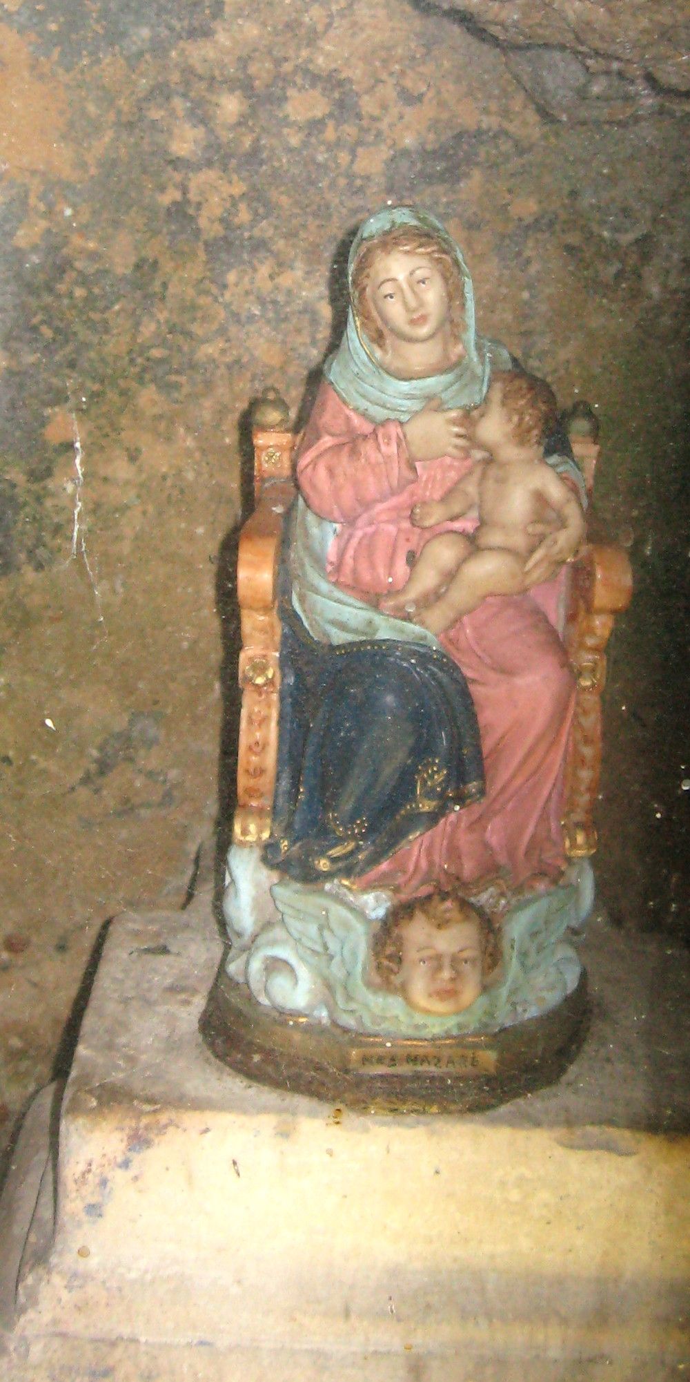 Nazaré, Portugal, Sítio, Sculpture: Nossa Senhora da Memória, recent reproduction, public domain, in: Ermida da Memória, niche; not photo-restriction at 2008-05-20